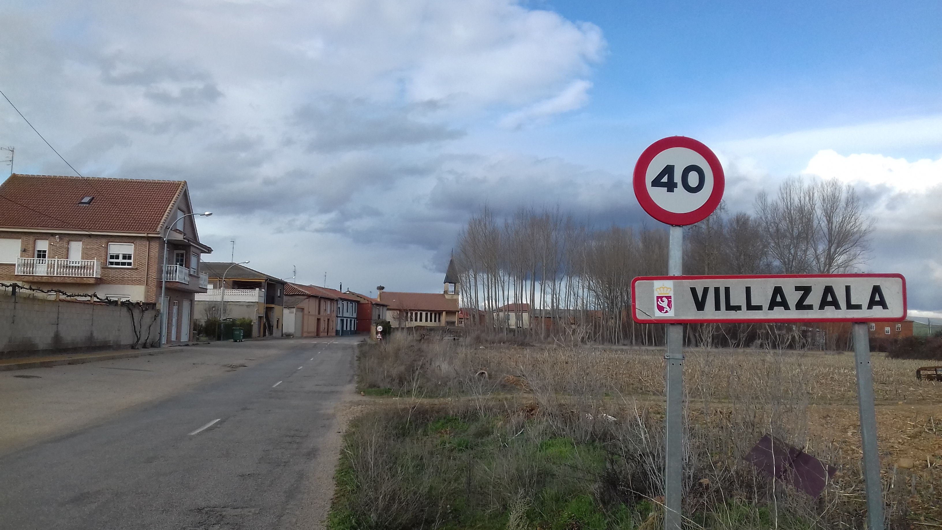 Villazala